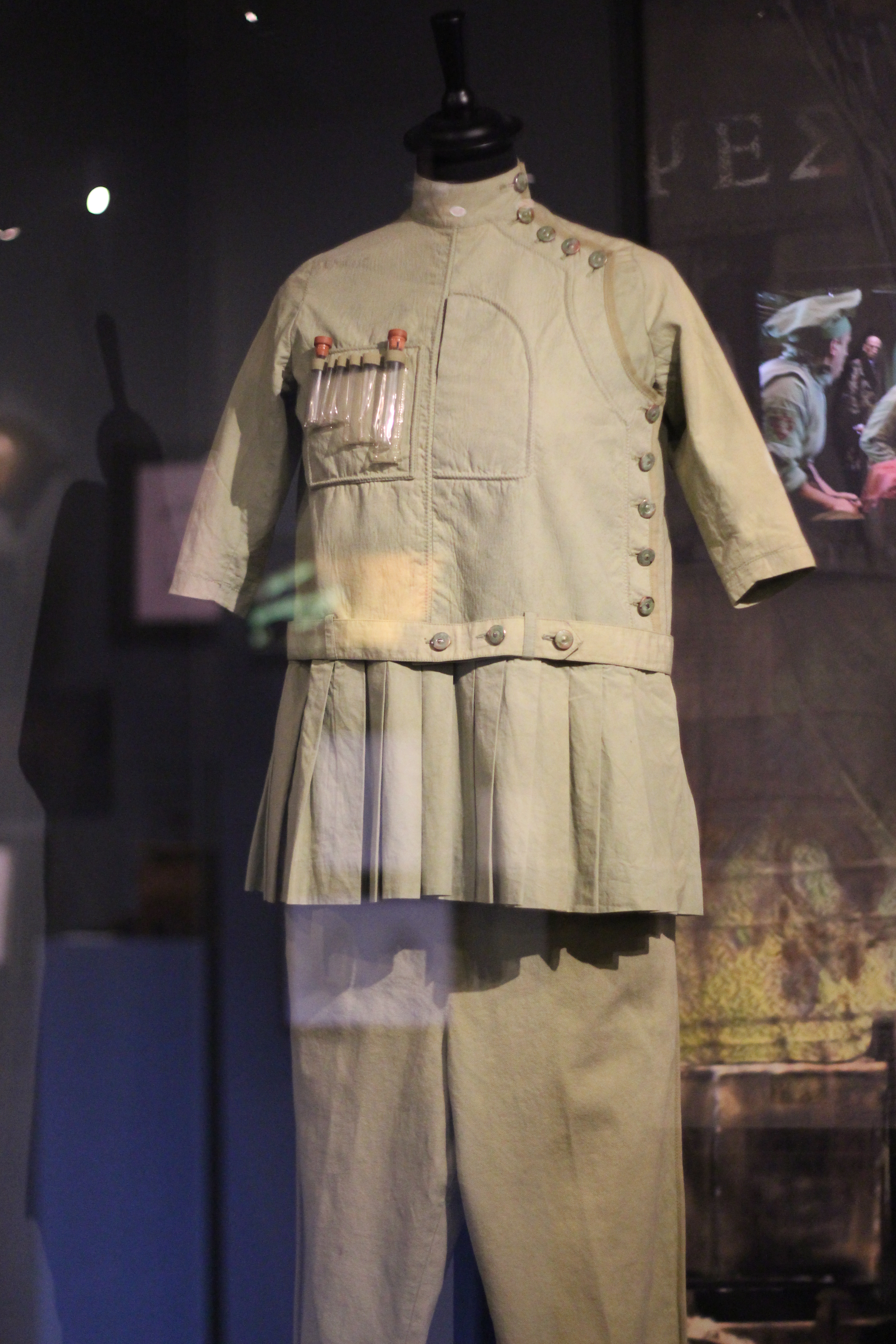 Costume d'un des clones (joués par Dominique Pinon) dans le film La Cité des enfants perdus (costume créé par Jean-Paul Gaultier). Exposition "Caro/Jeunet" au musée Minature et Cinéma en 2018-2019.